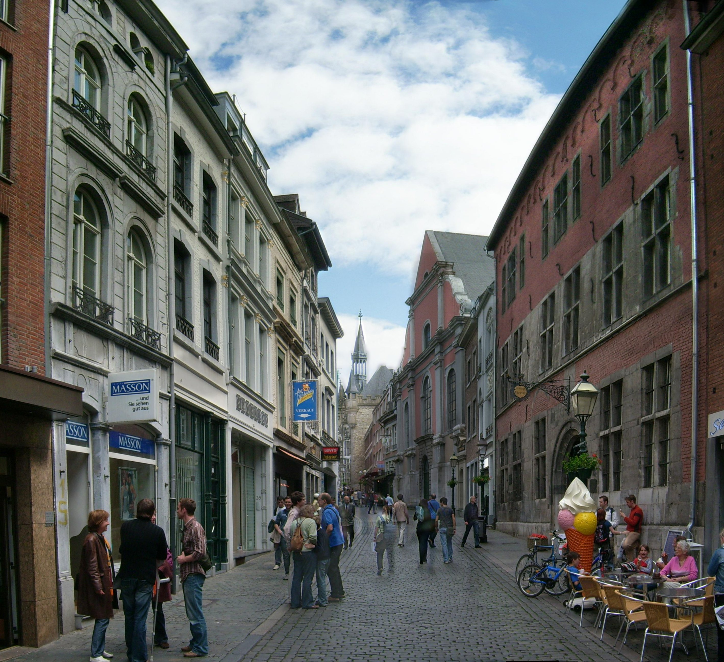 Pontstrasse in Aachen vor Zeitungsmuseum